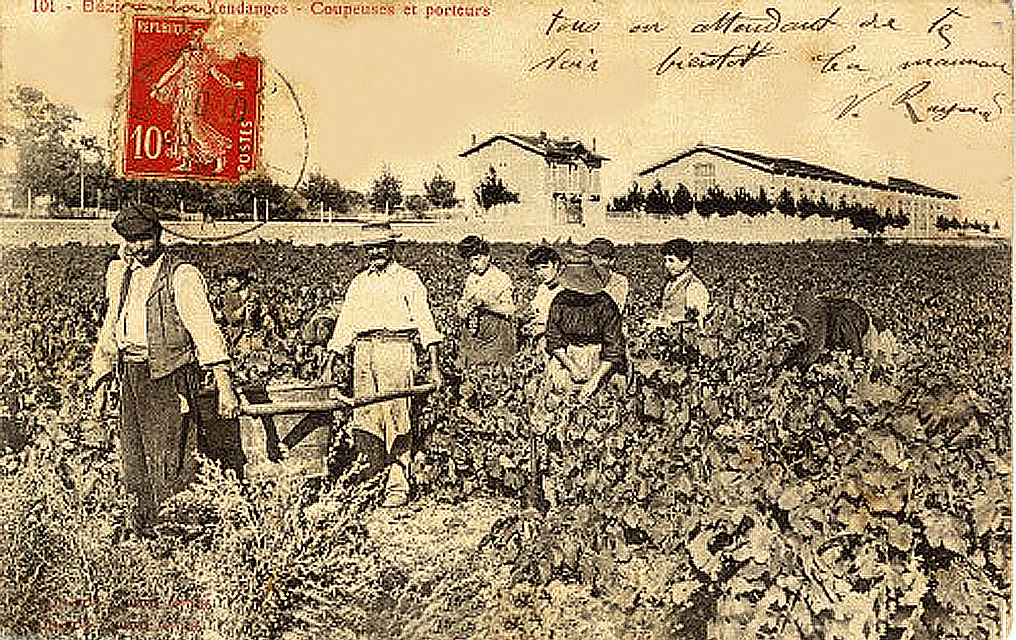 Beziers - Les vendanges, coupeuses et porteurs